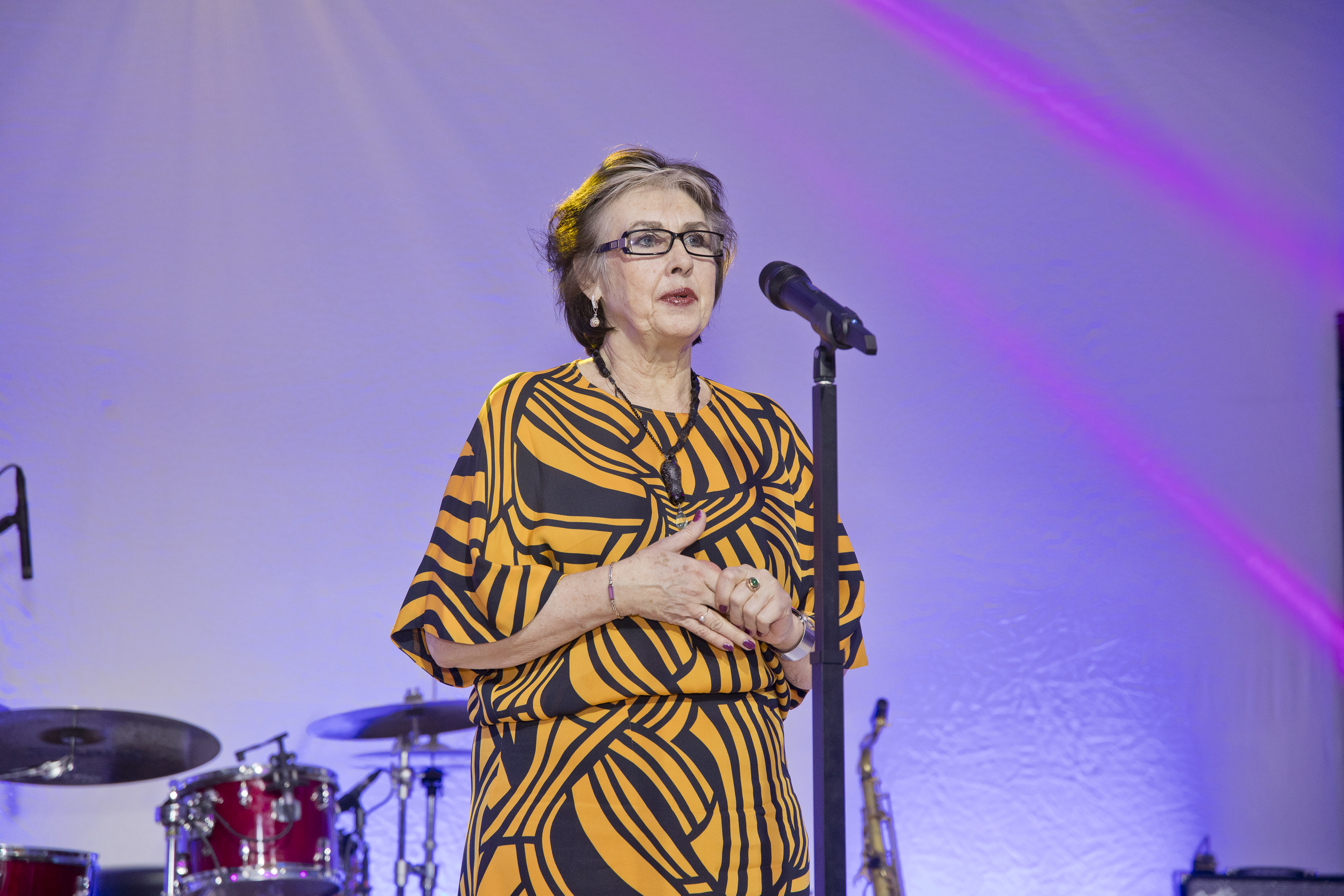 Sirje Helme, SA Eesti Kunstimuuseum juhatuse liige